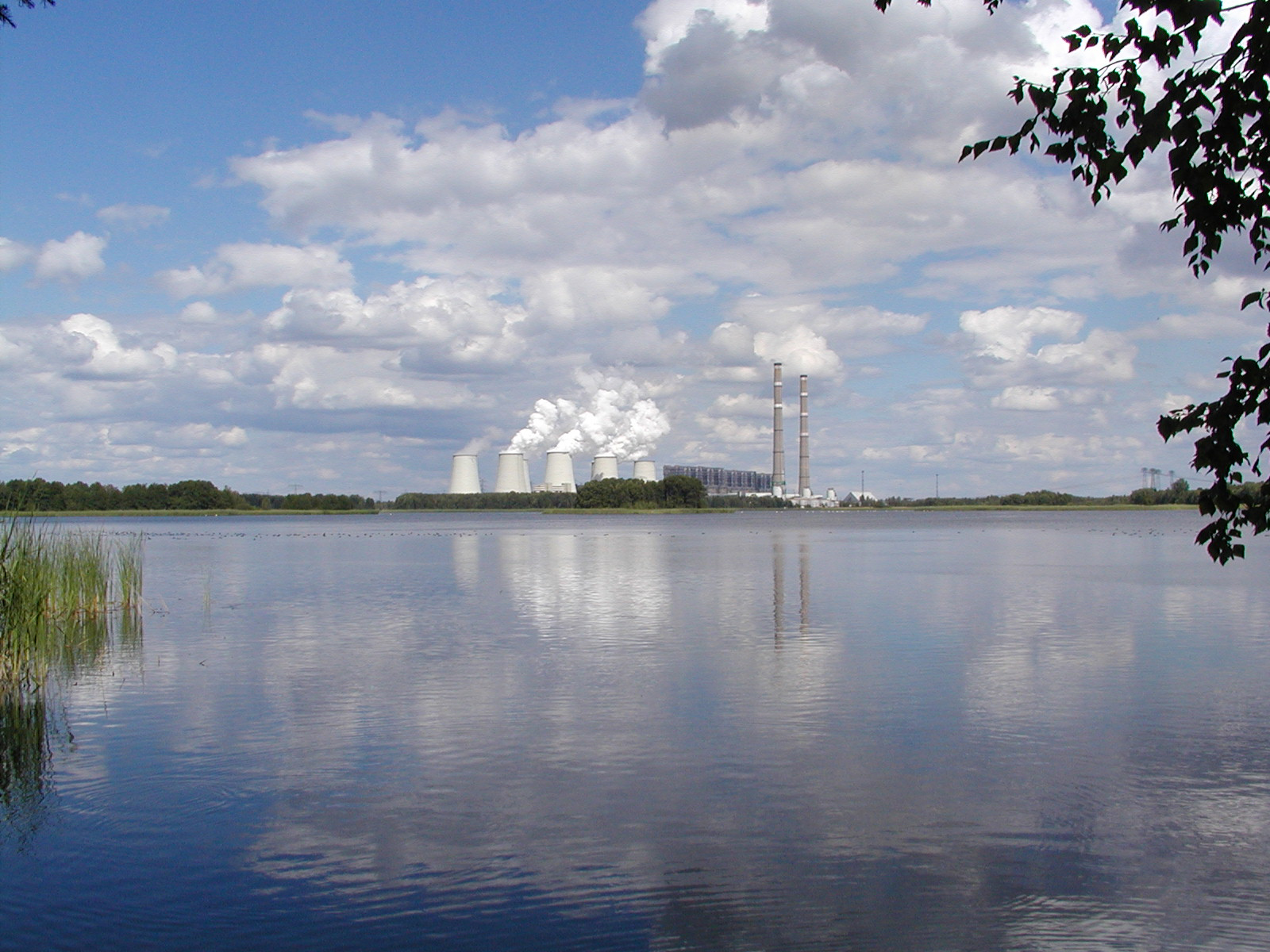 Das Kohlekraftwerk Jänschwalde im Sommer